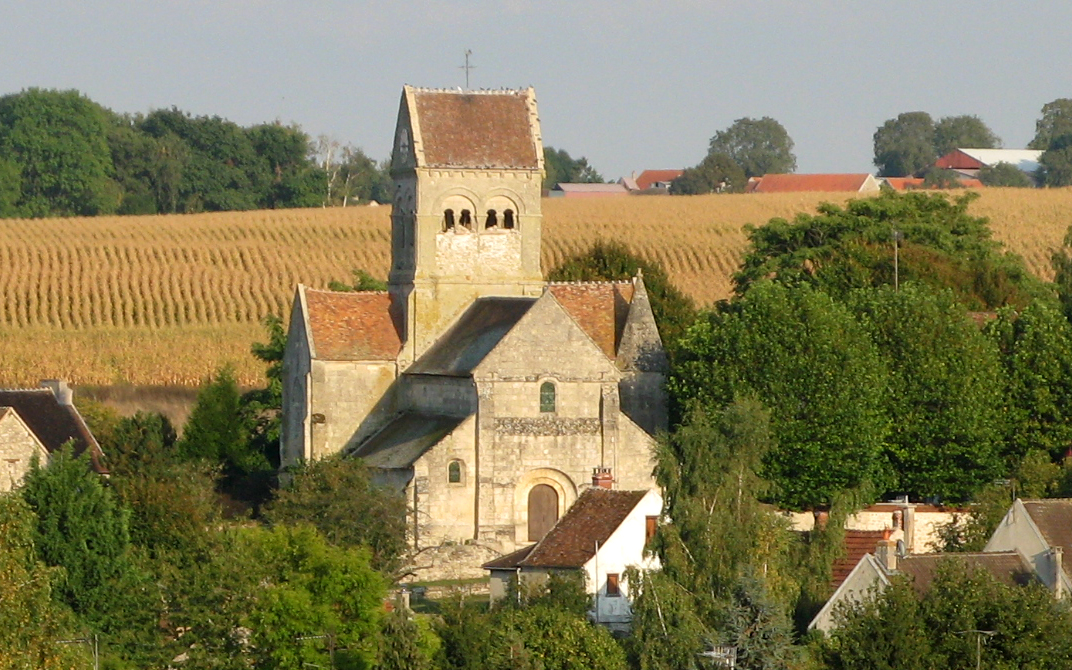 Latilly (Aisne, France) - L'église Saint-Laurent. . .